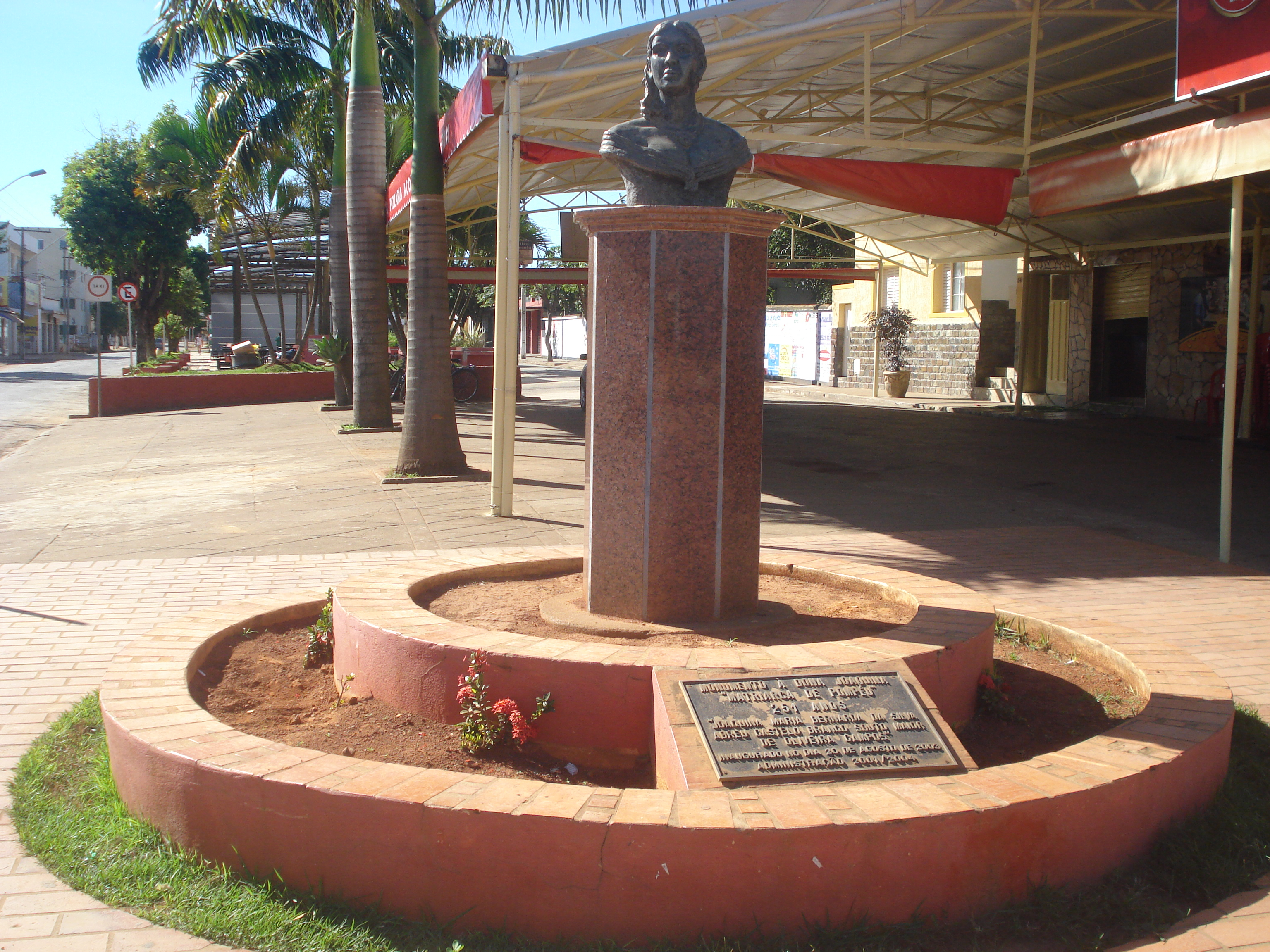 Busco de Dona Joaquina do Pompéu, localizado na avenida principal da cidade.